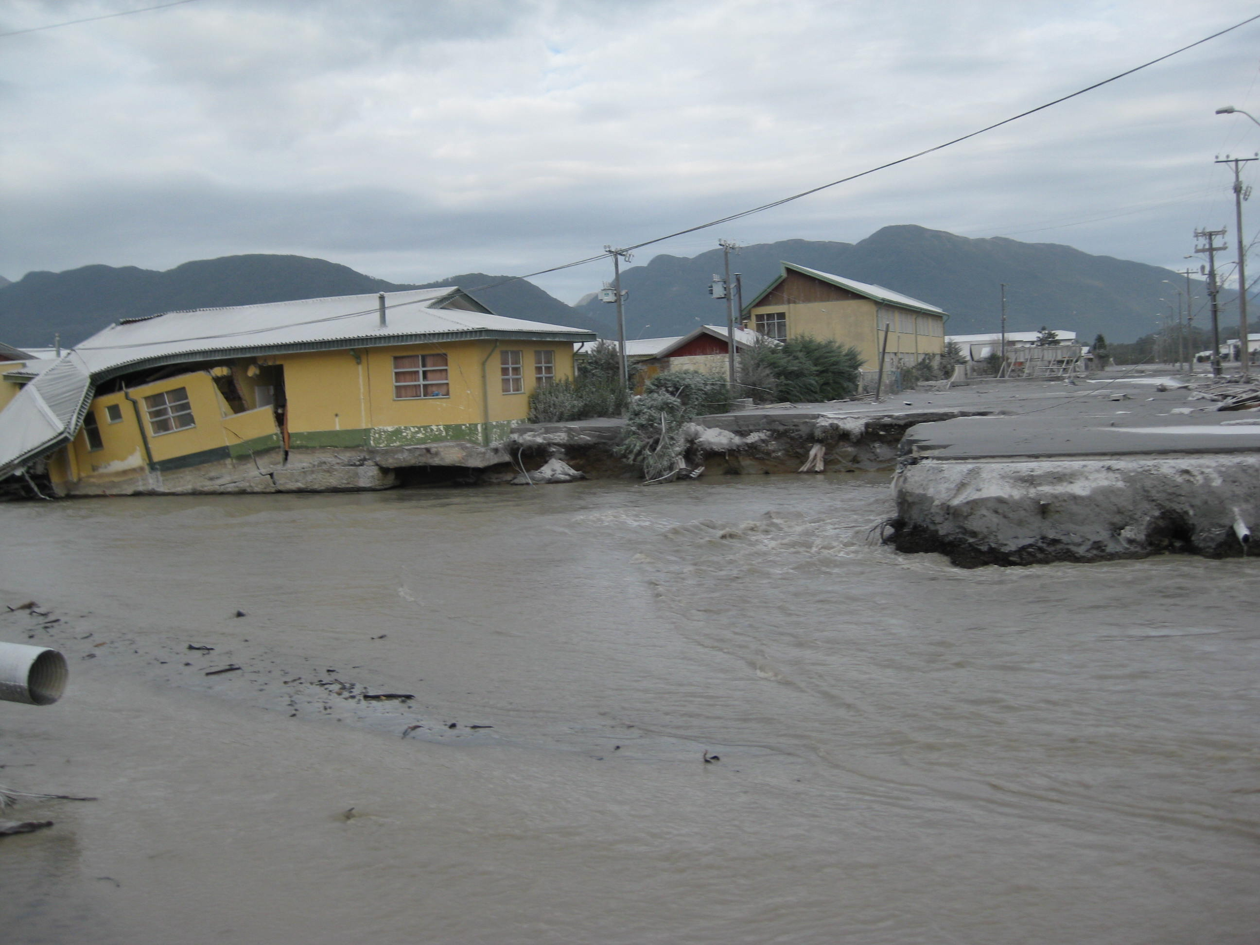 Cortesía de mi Viejo Carlitos